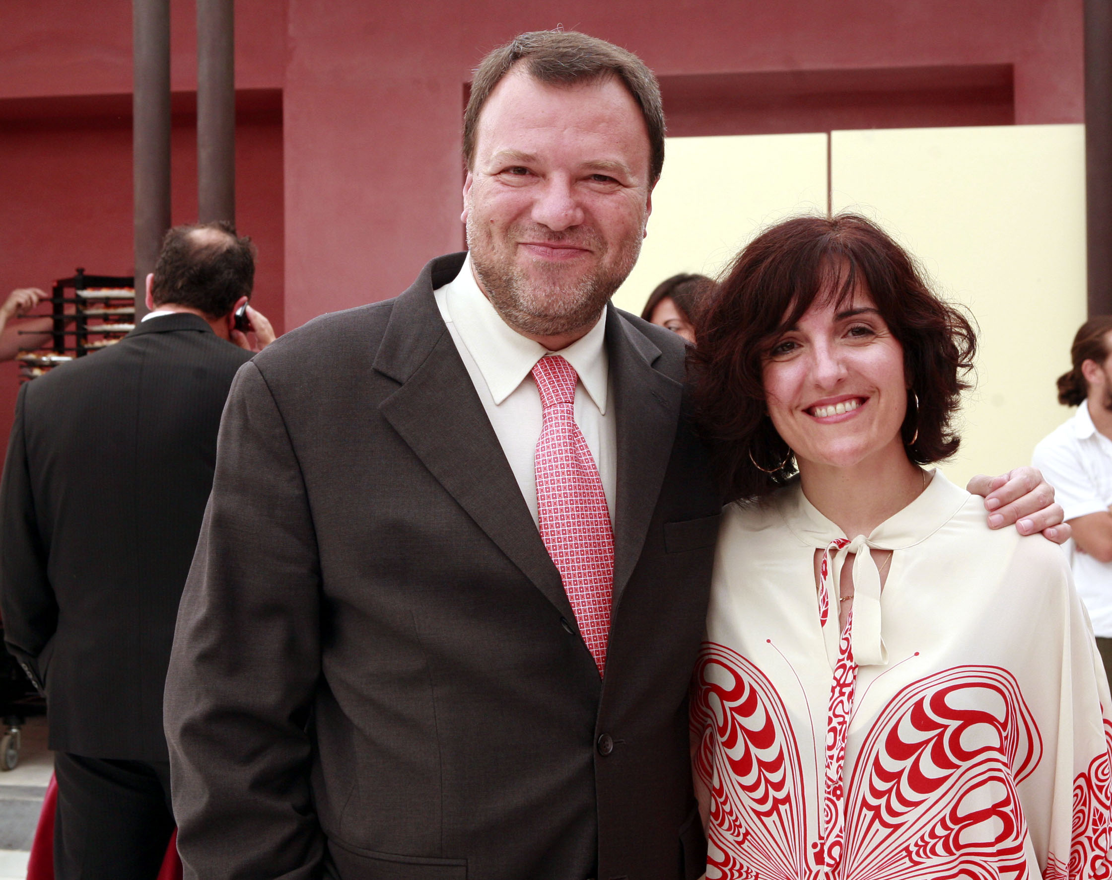 Alfredo Sánchez Monteseirín, alcalde de Sevilla, y la escritora gaditana Elvira Lindo en la inauguración de los Cursos de Verano 2007 de la Universidad Internacional de Andalucía en Sevilla (España).